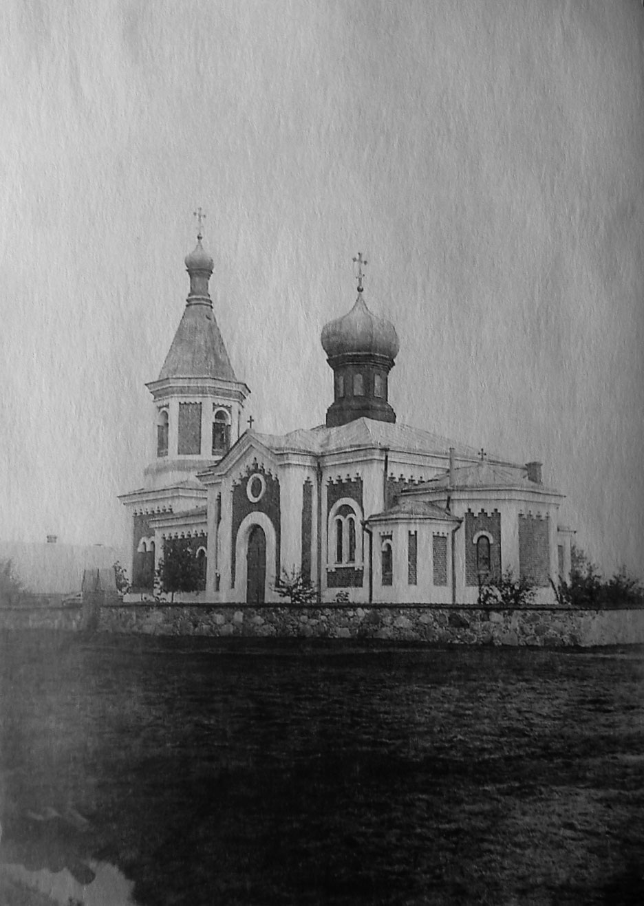 Беларуская (тарашкевіца): Казяны (Kaziany). Царква-мураўёўка